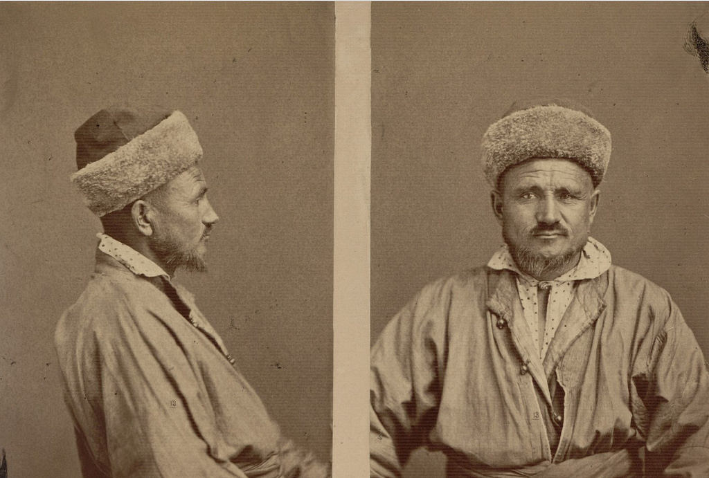 Оренбуржье. Башкир-1. 1870-е. Автор К. Фишер.